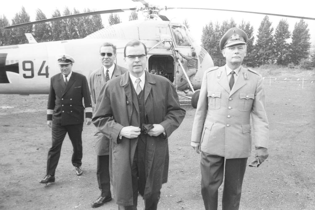 Begrüßt vom Chef des Stabes beim Wehrbereichskommando I Brigadegeneral Gerhard Schmidt (rechts).